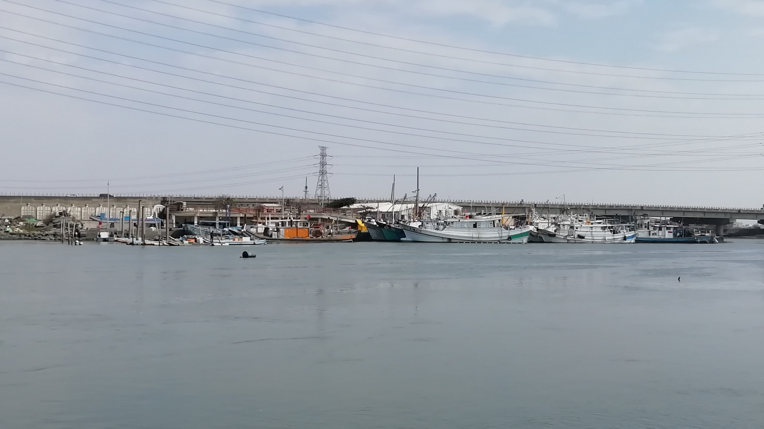 中文（台灣）: 塭仔漁港一景